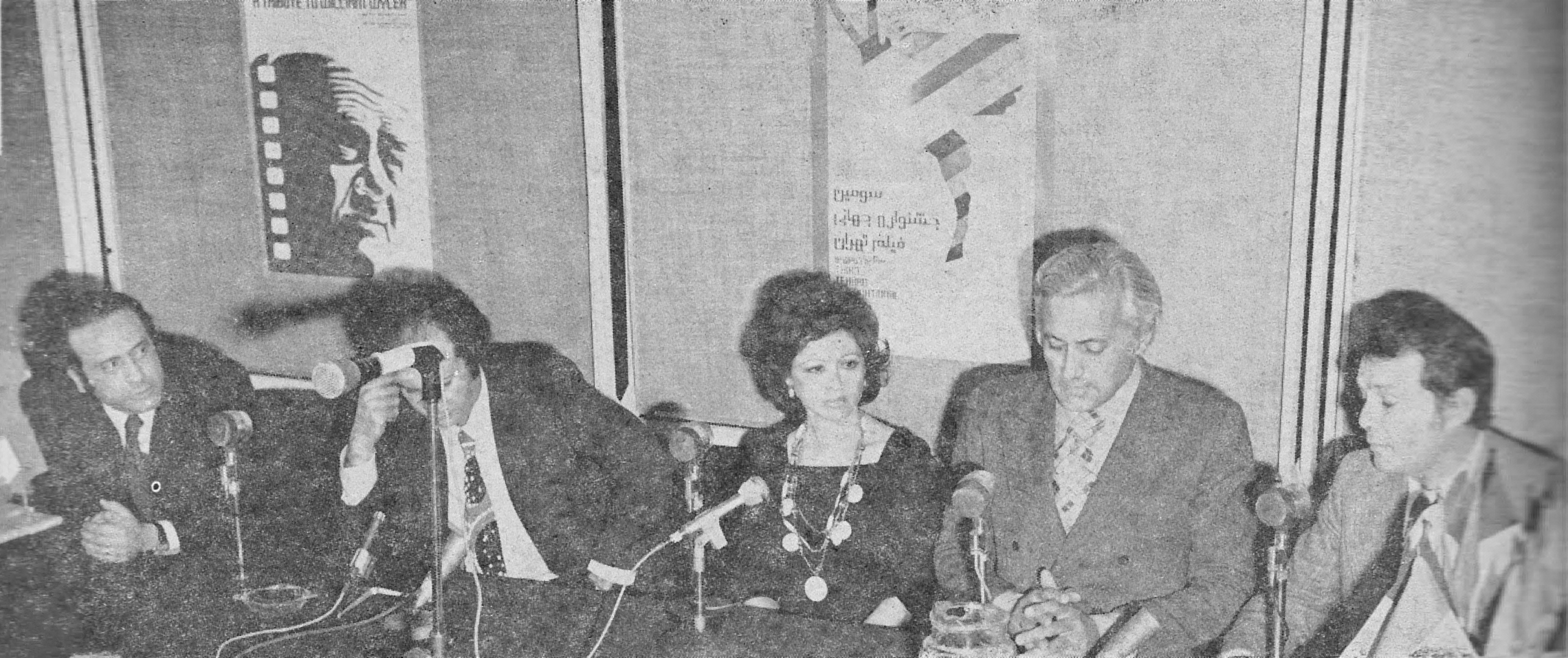 نشست خبری فیلم من راه‌حل می‌خواهم در سومین دوره جشنواره جهانی فیلم تهران. از راست به چپ: تهیه‌کنندهٔ فیلم راه حل می‌خواهم، منوچهر انور، فاطن حمامه، سعید مزروک، مترجم مصری. چاپ‌شده در «بولتن سومین جشنواره جهانی فستیوال تهران».